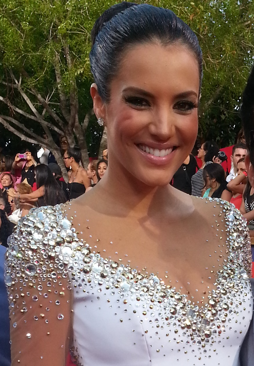 Gaby Espino, actriz, modelo y presentadora de televisión venezolana.